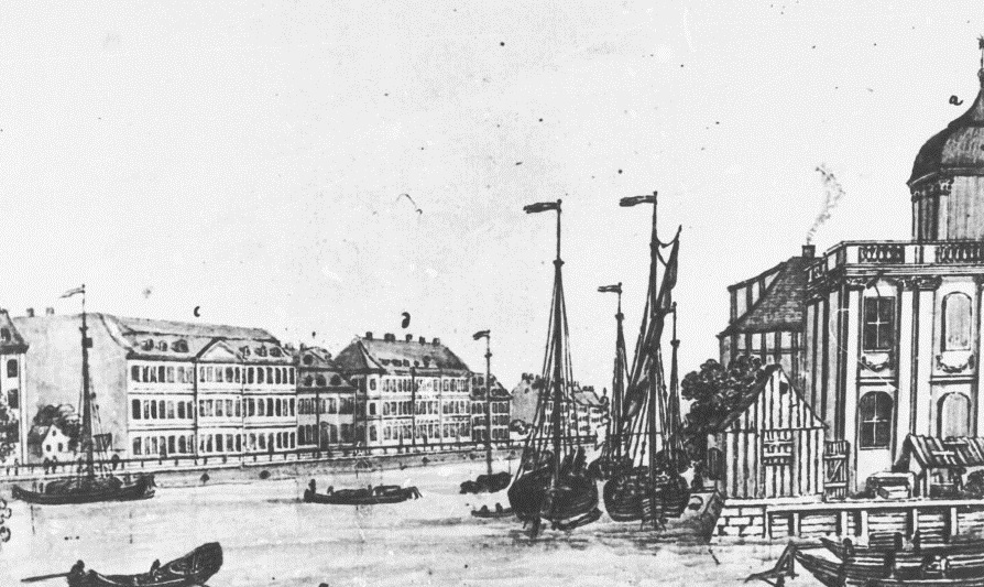 Blick auf die östliche Seite der Spree in Berlin mit dem Joachimsthalschen Gymnasium, dem alten Gebäude des Hotel de Saxe und der alten Allgemeinen Kriegsschule (Militärakademie); rechts (angeschnitten) das Gebäude der Berliner Börse im sogenannten Neuen Lusthaus am Berliner Lustgarten.